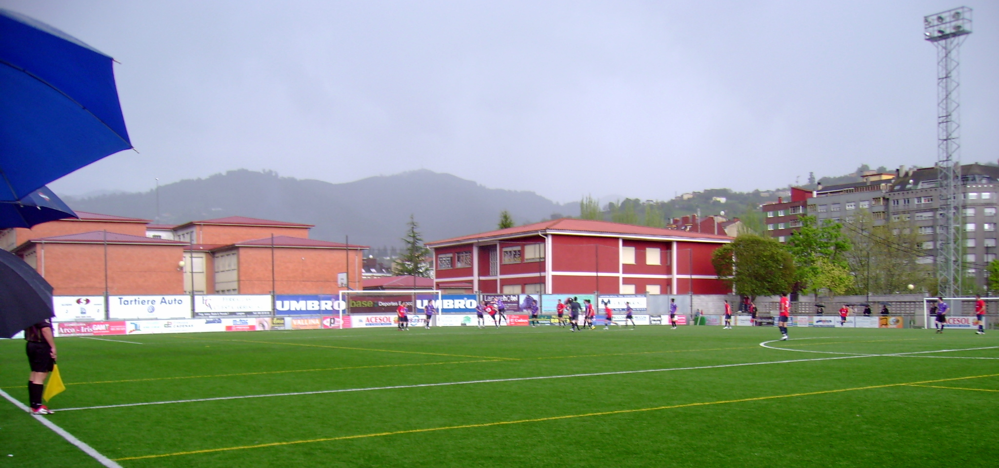 Campo de Los Llerones, en Sama de Langreo. En juego un partido de Liga Nacional Juvenil (Alcázar - Sta Teresa)